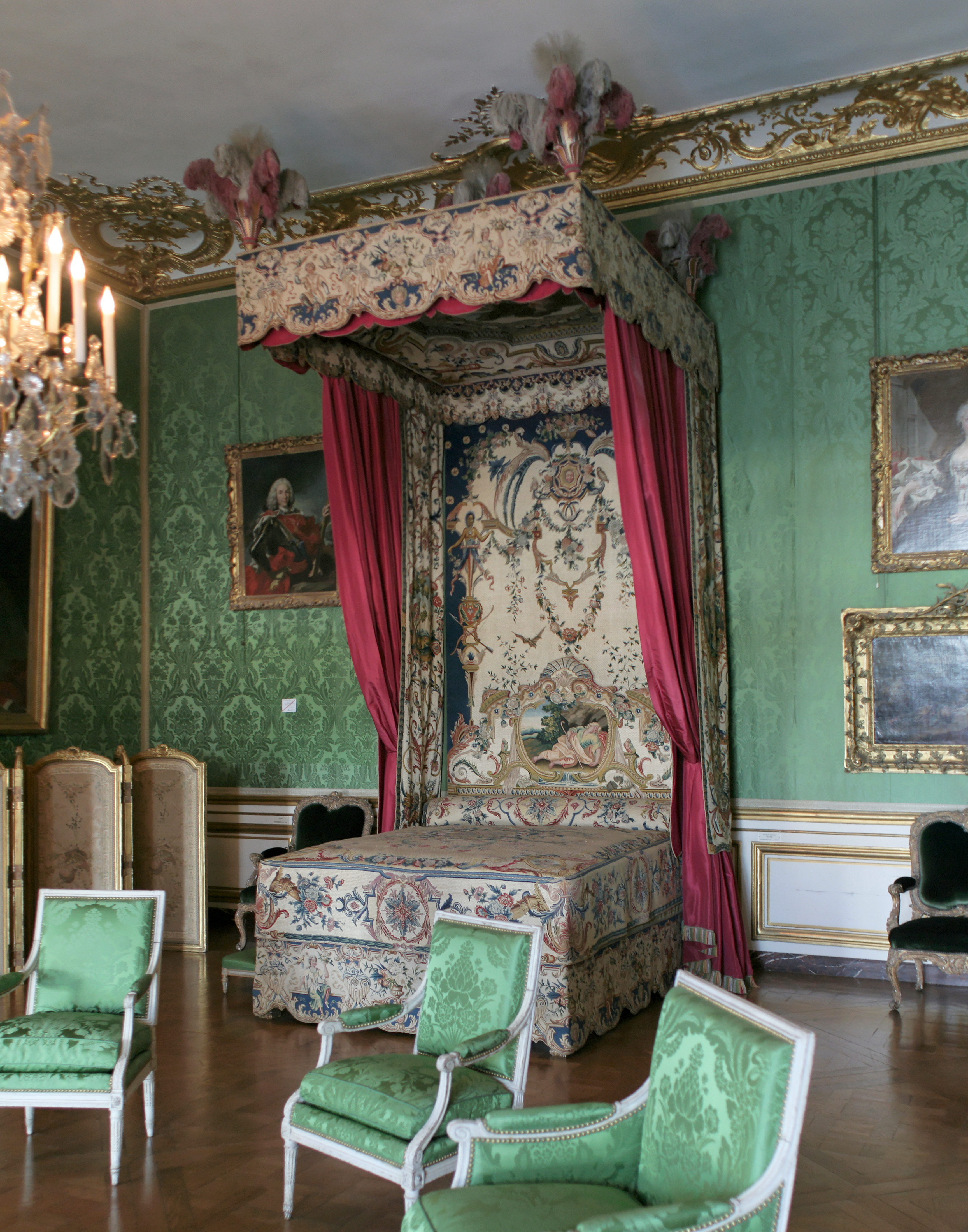 Château de Versailles, appartements du Dauphin et de la Dauphine, chambre du Dauphin. Lit à la duchesse (c'est-à-dire dont l'impériale n’est pas soutenue par des piliers), brodé au point de Saint-Cyr, provenant du mobilier de la marquise de Créquy. Décors de grotesques et d'allégories à la nuit : les étoffes sont ornées de motifs de rinceaux et de médaillons réalisés au petit point, celui du dosseret représente Le sommeil du berger Endymion. Numéro d'inventaire : V4131